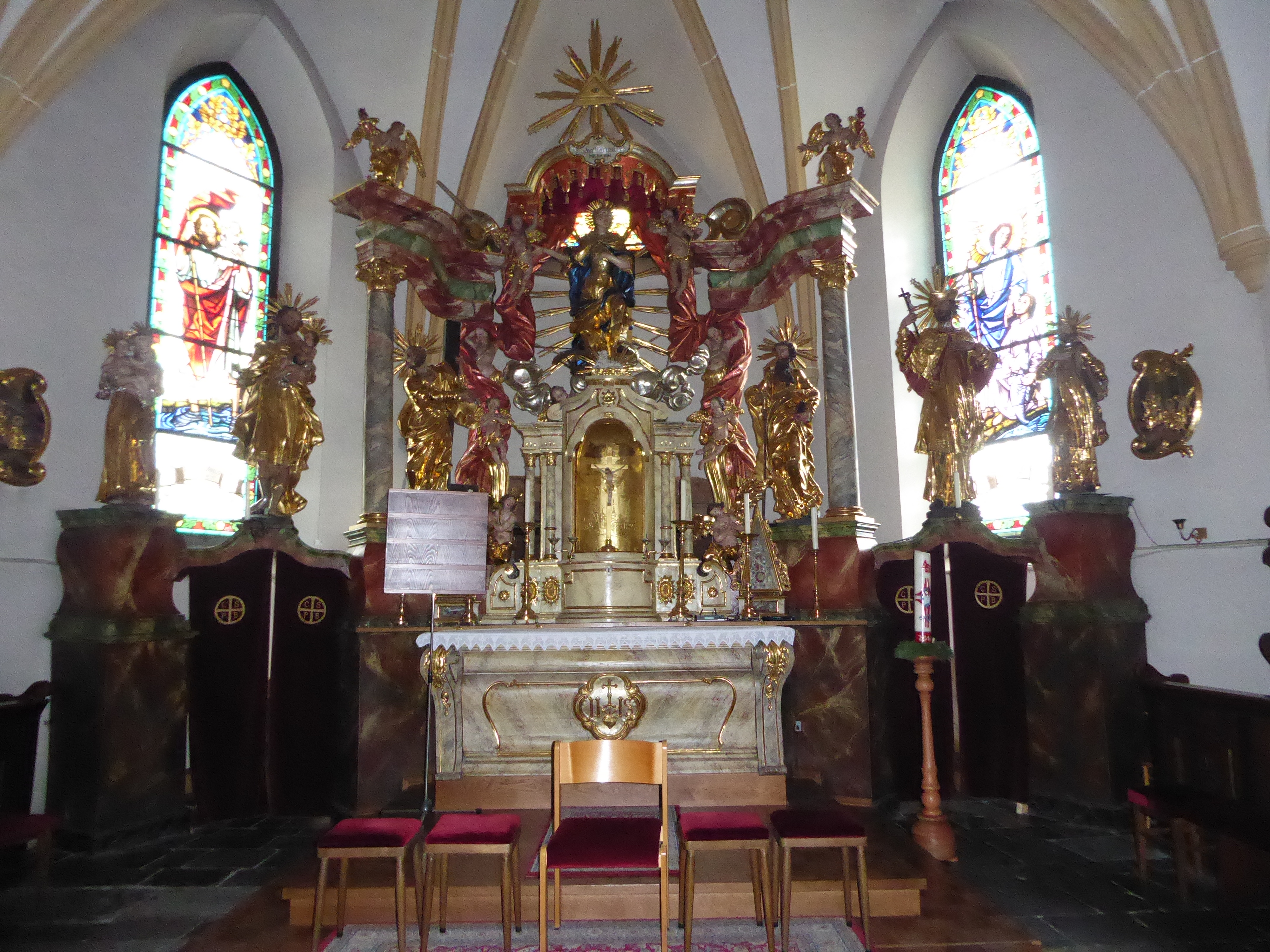 Pfarrkirche hl. Katharina, Neumarkt in der Steiermark, Steiermark, Österreich - Hochaltar mit Statue hl. Katharina, flankiert von Heiligenfiguren: Antonius v.P., Josef, Petrus, Paulus, Johannes Nepomuk, Franz X.(?)